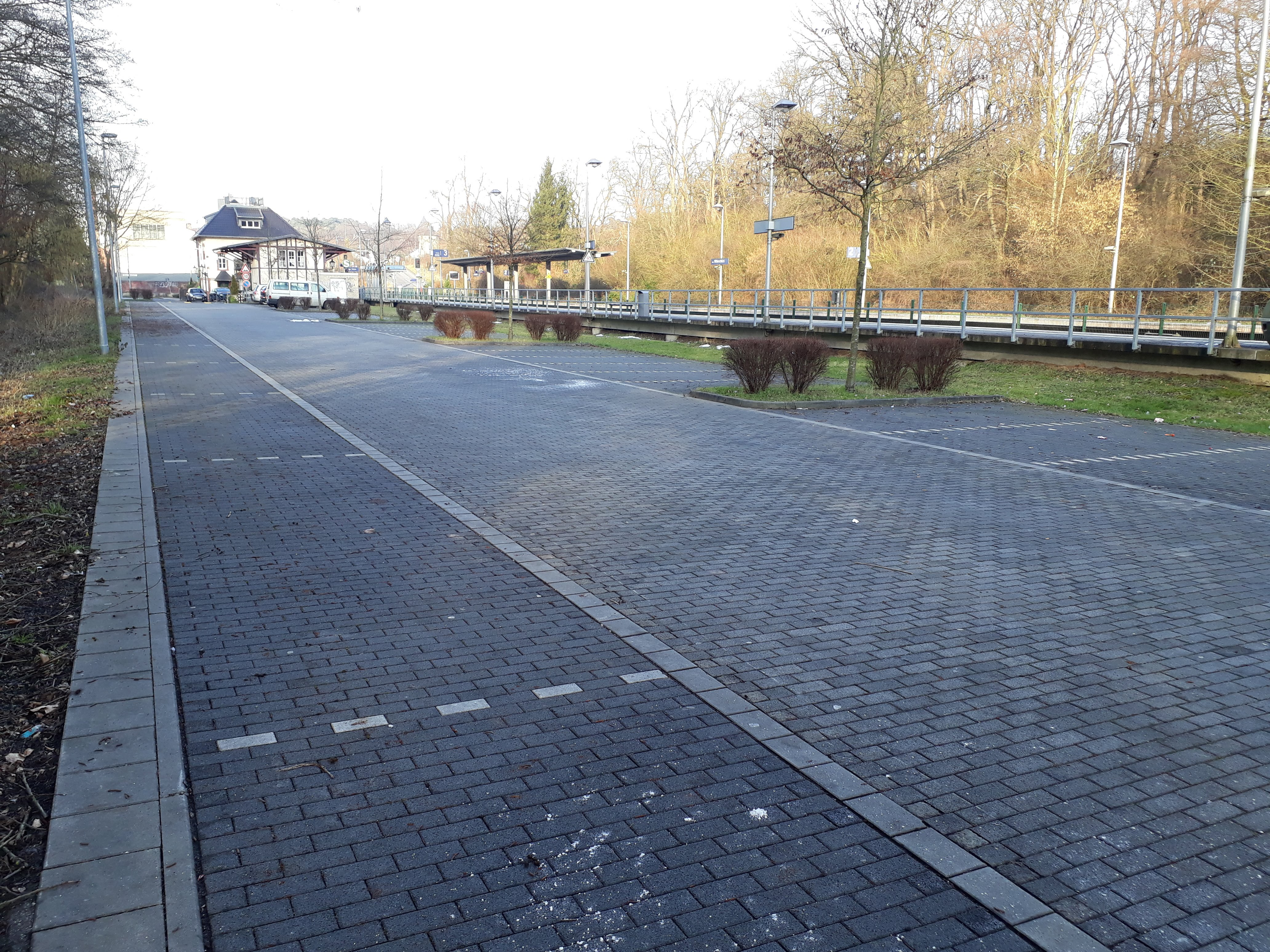 Bahnhof Alfter-Witterschlick: P+R-Parkplatz